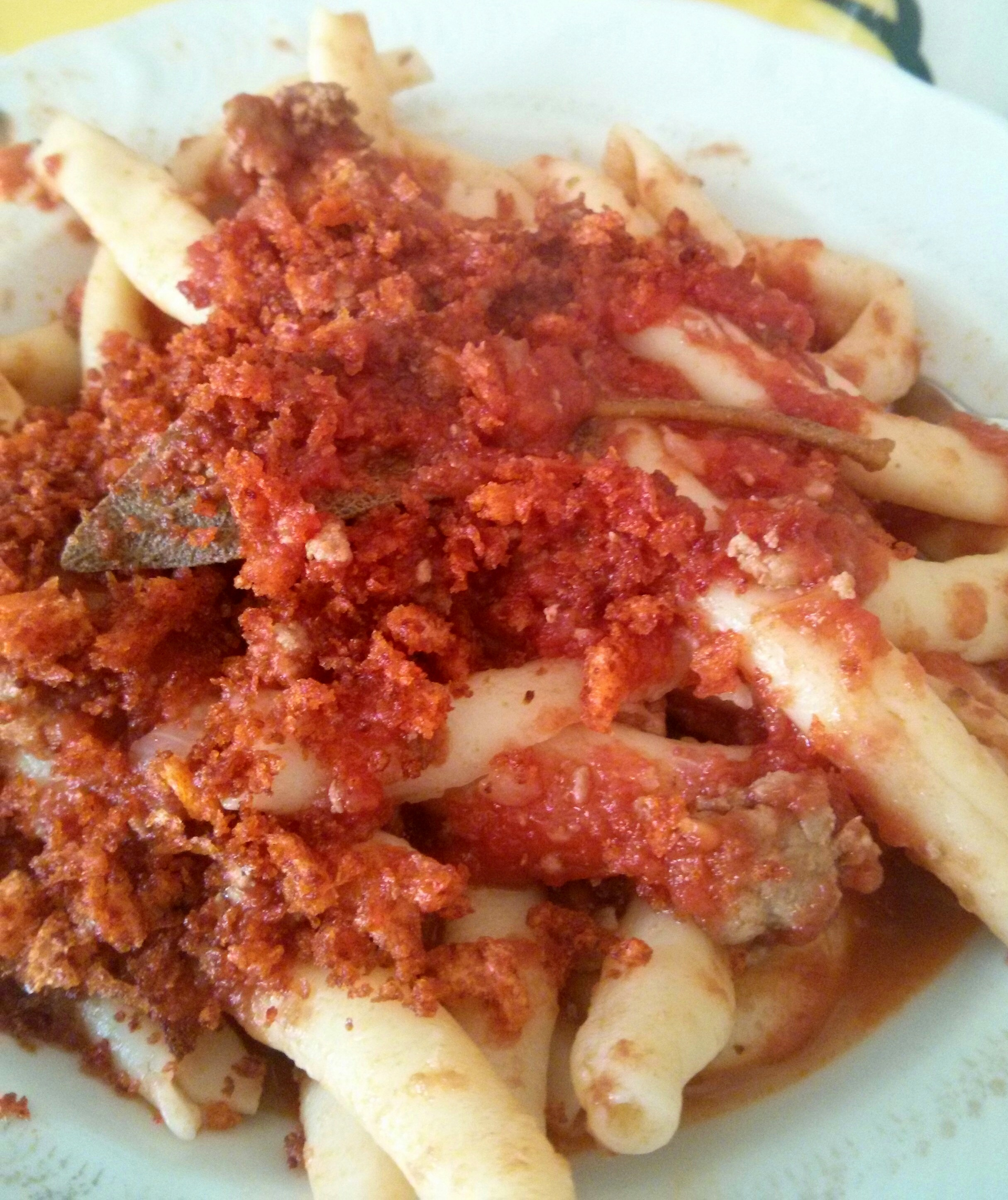 Traditional Rotondellese pasta called Fruzz'ul c'a muddica